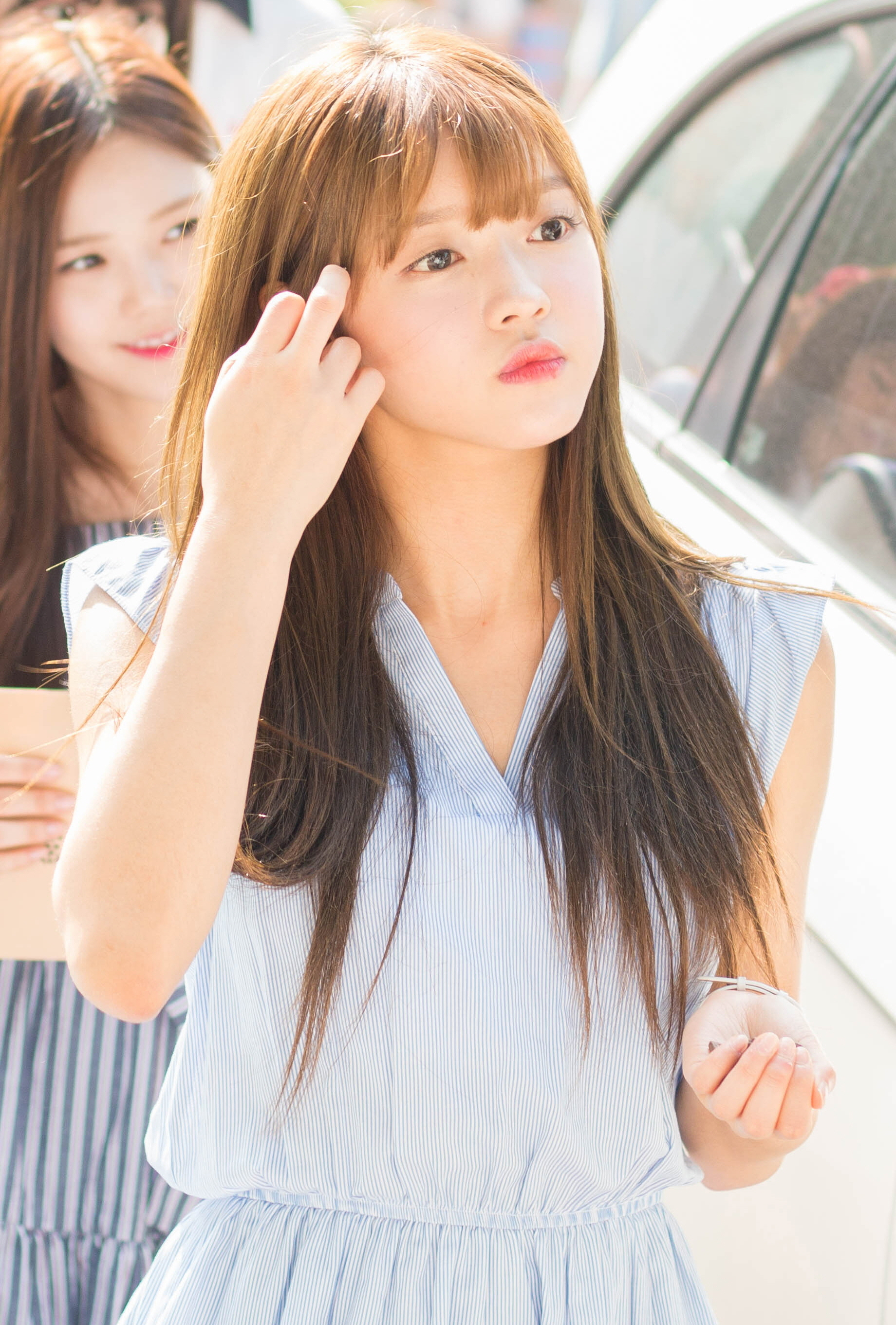 160805 오마이걸 뮤직뱅크 중간퇴근길